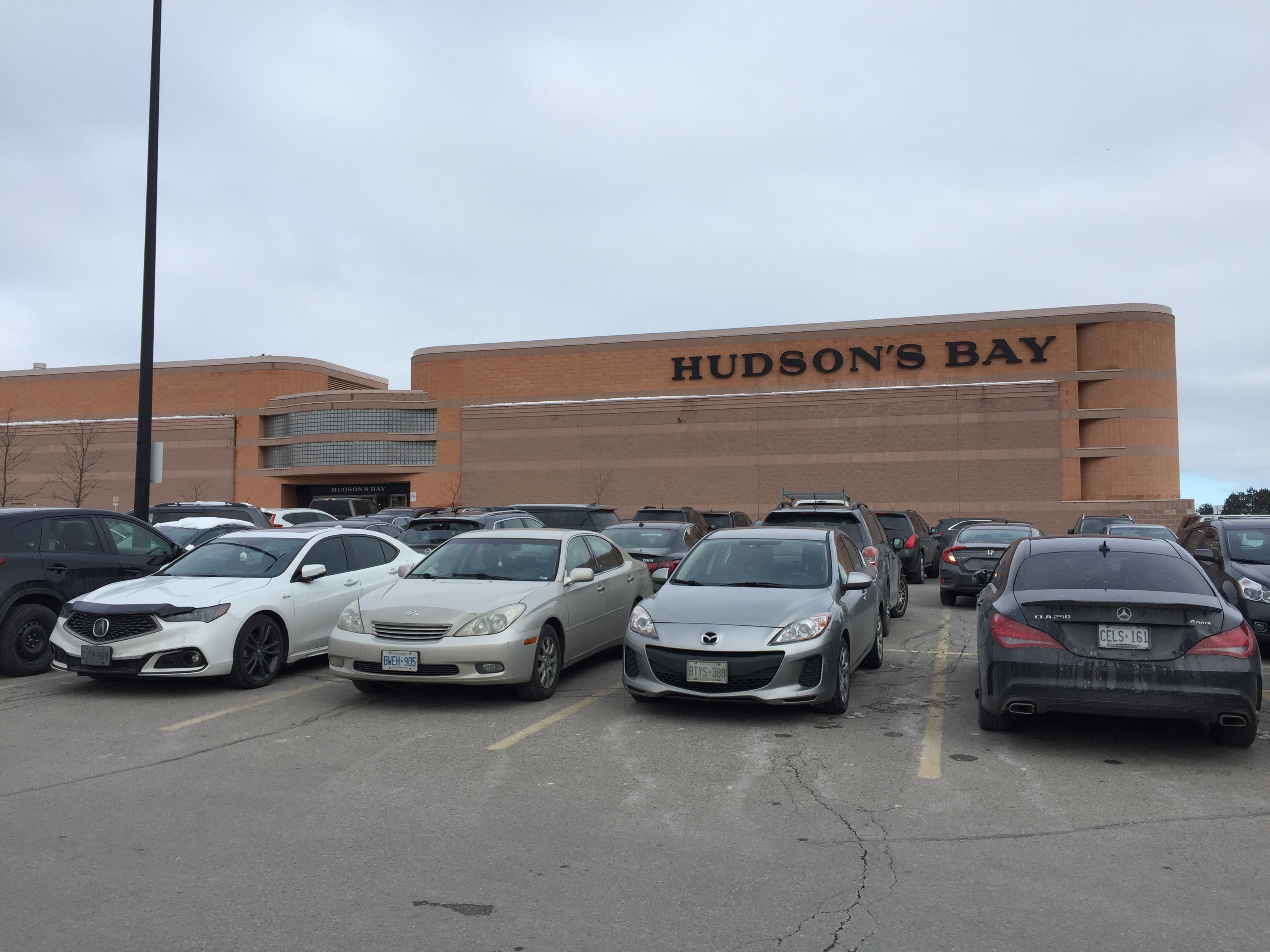 کوردی: ھێدسن بەی